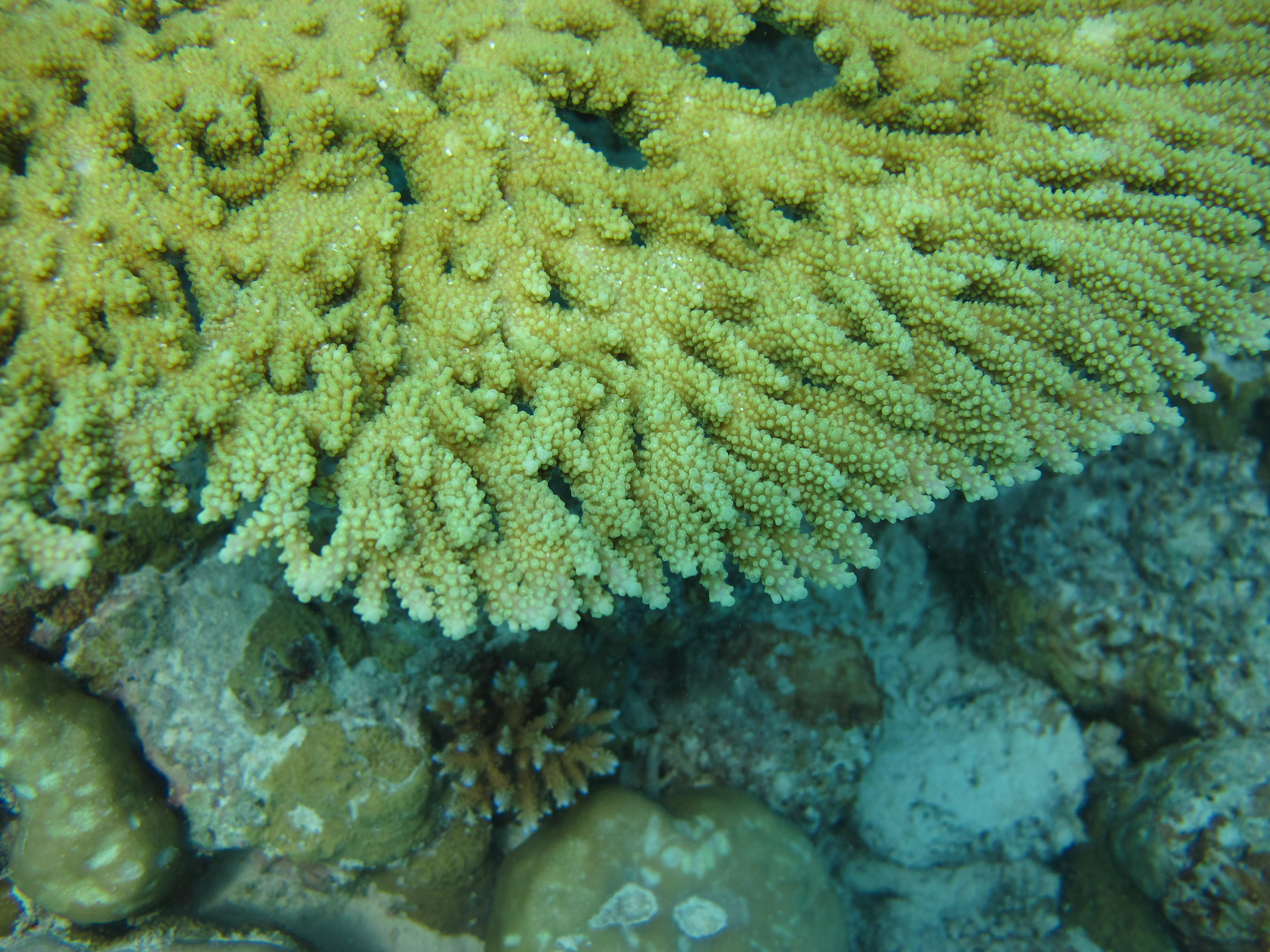 Une colonie de corail Acropora clathrata aux Maldives (atoll de Baa).